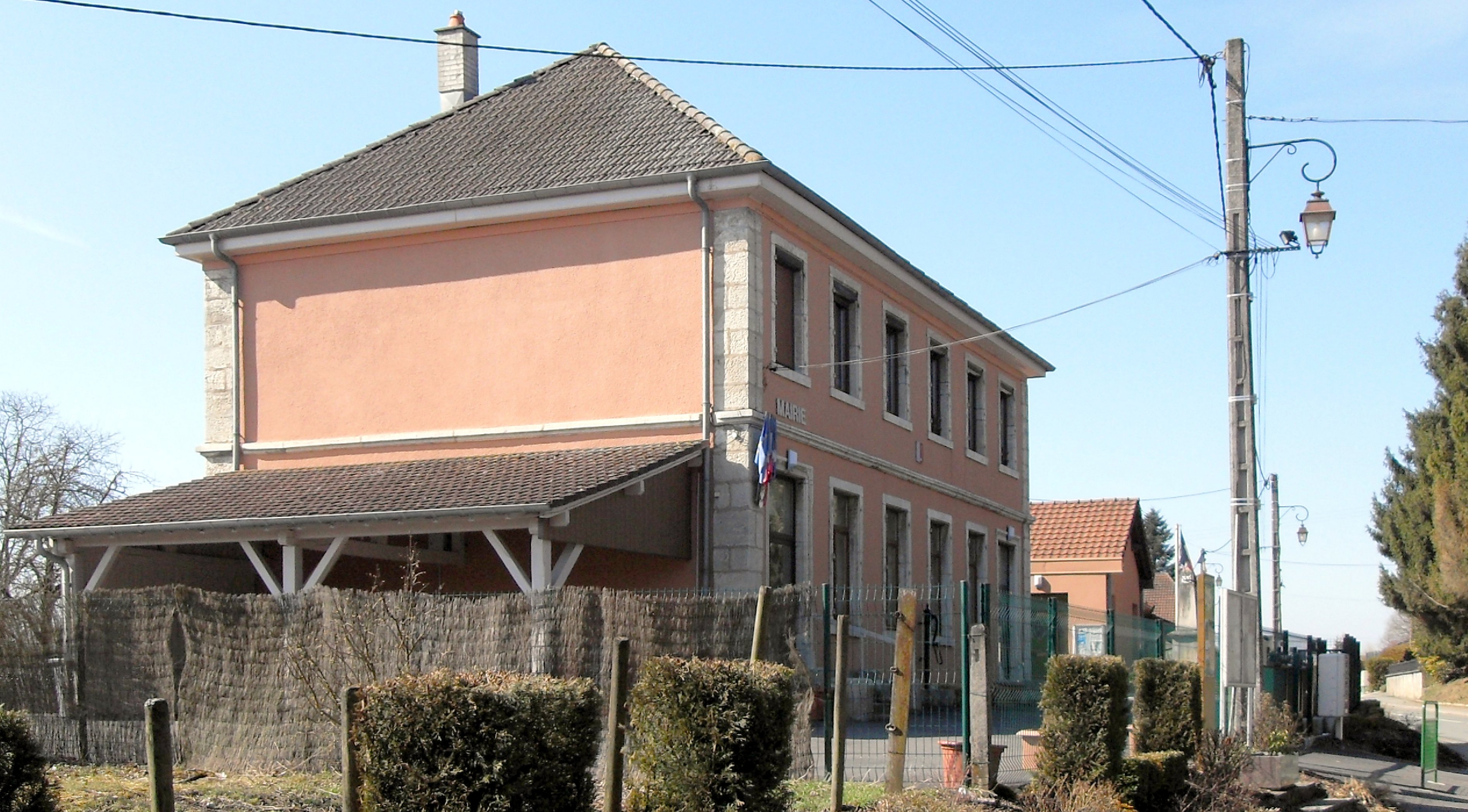 La mairie de Grosne